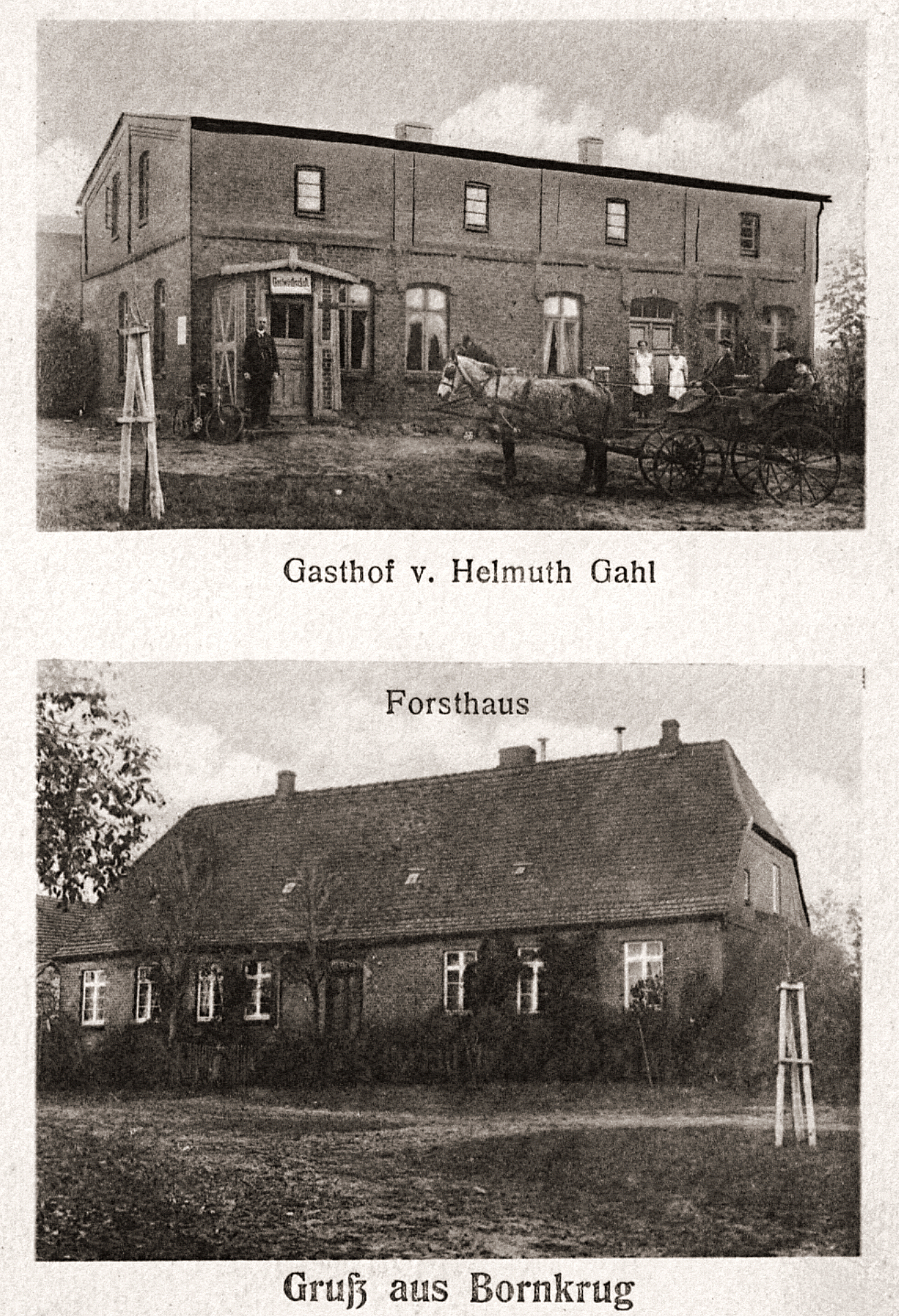 Gasthof und Forsthaus in Bornkrug